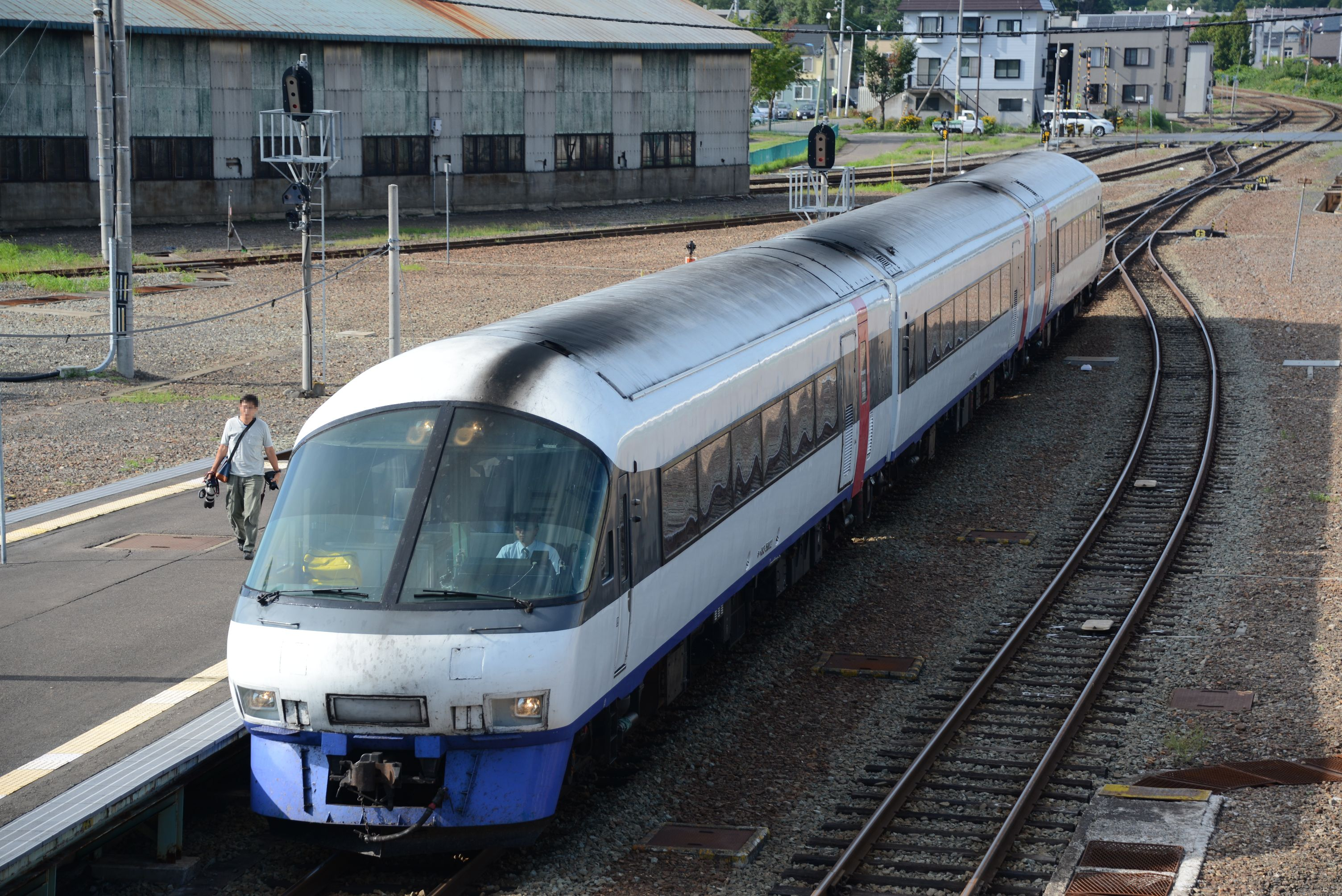 ヌプリ号（倶知安駅）